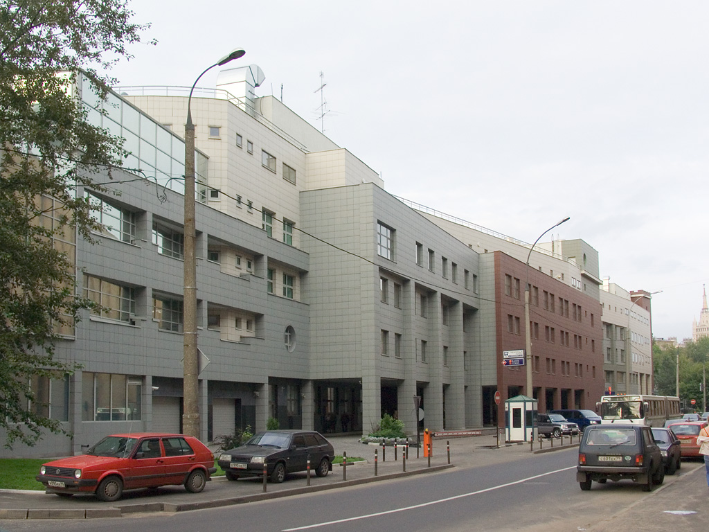 Штаб-квартира «Базового элемента» на Рочдельской улице в Москве